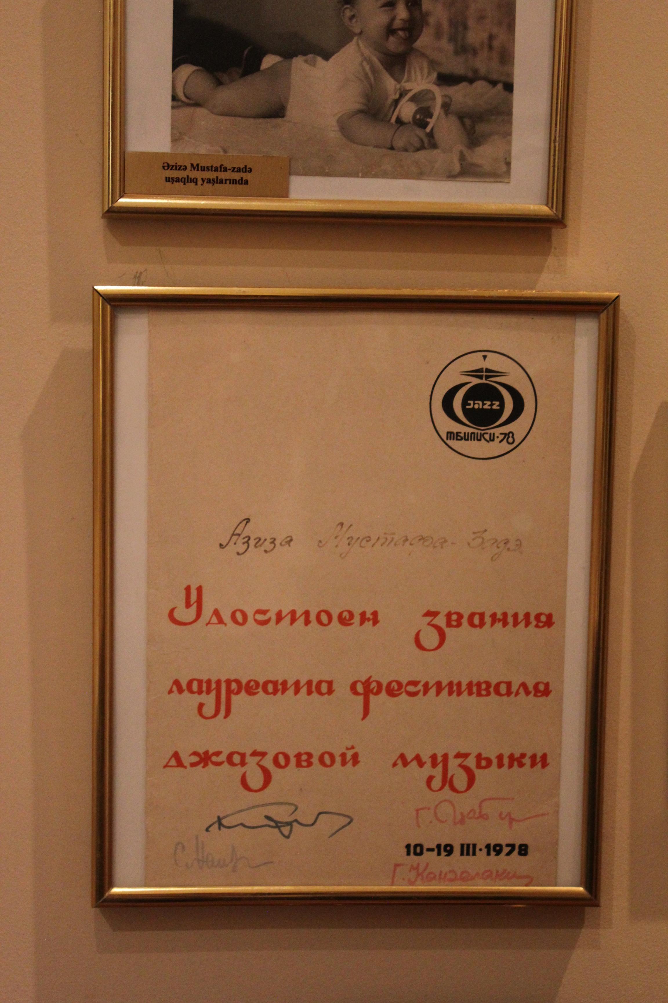 Экспонаты в доме-музее азербайджанского джазового композитора и пианиста Вагифа Мустафазаде.